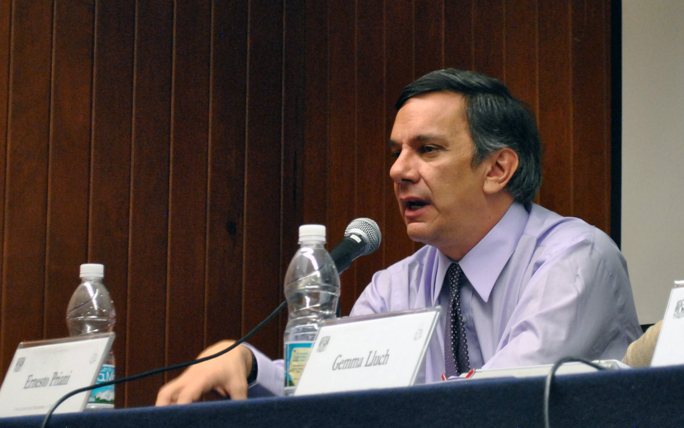 El doctor Ernesto Priani Saisó, durante la mesa de discusión "El camino del papel a la pantalla", Ciudad Universitaria, Ciudad de México.